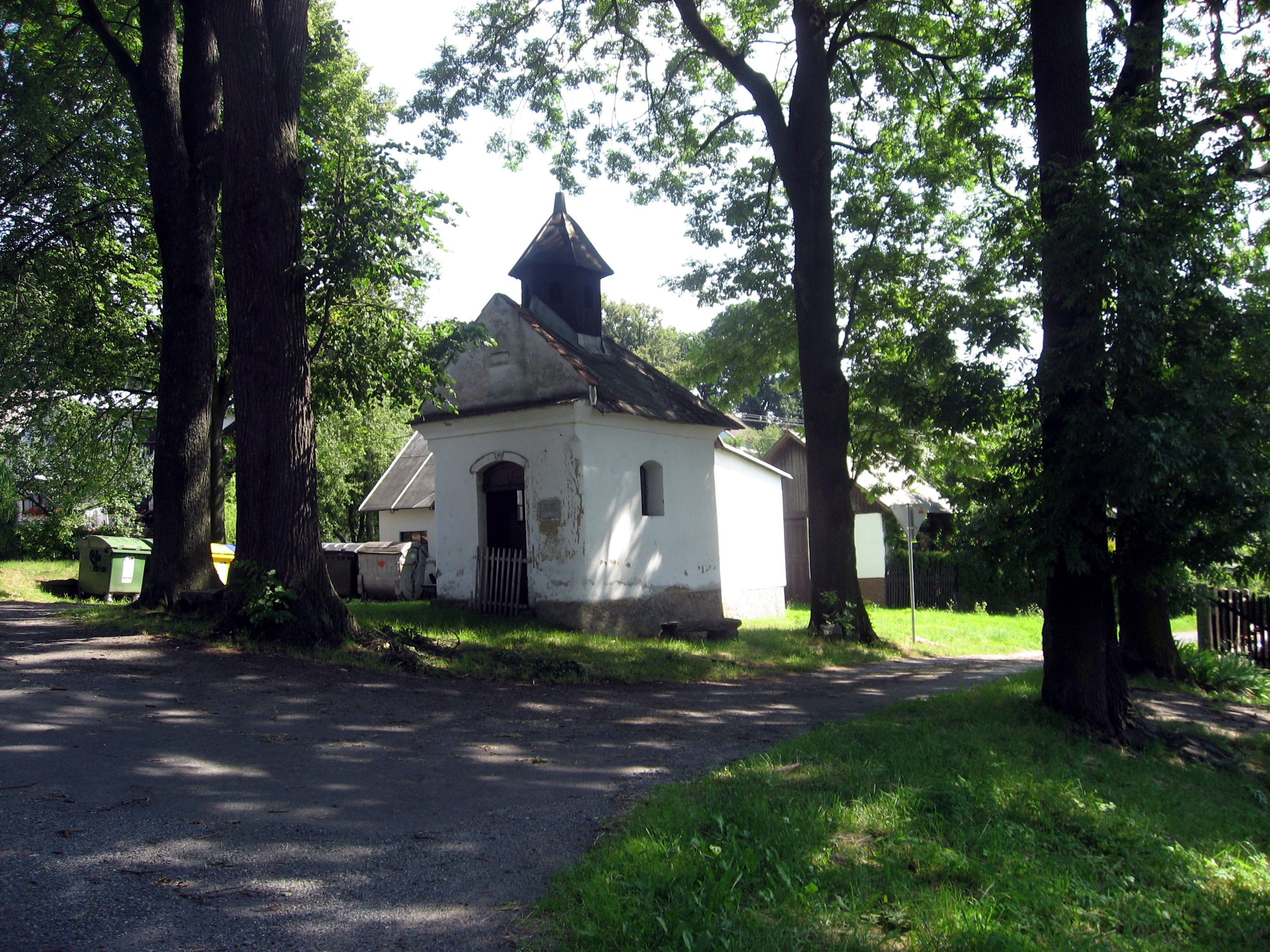 Jedouchov, kaplička